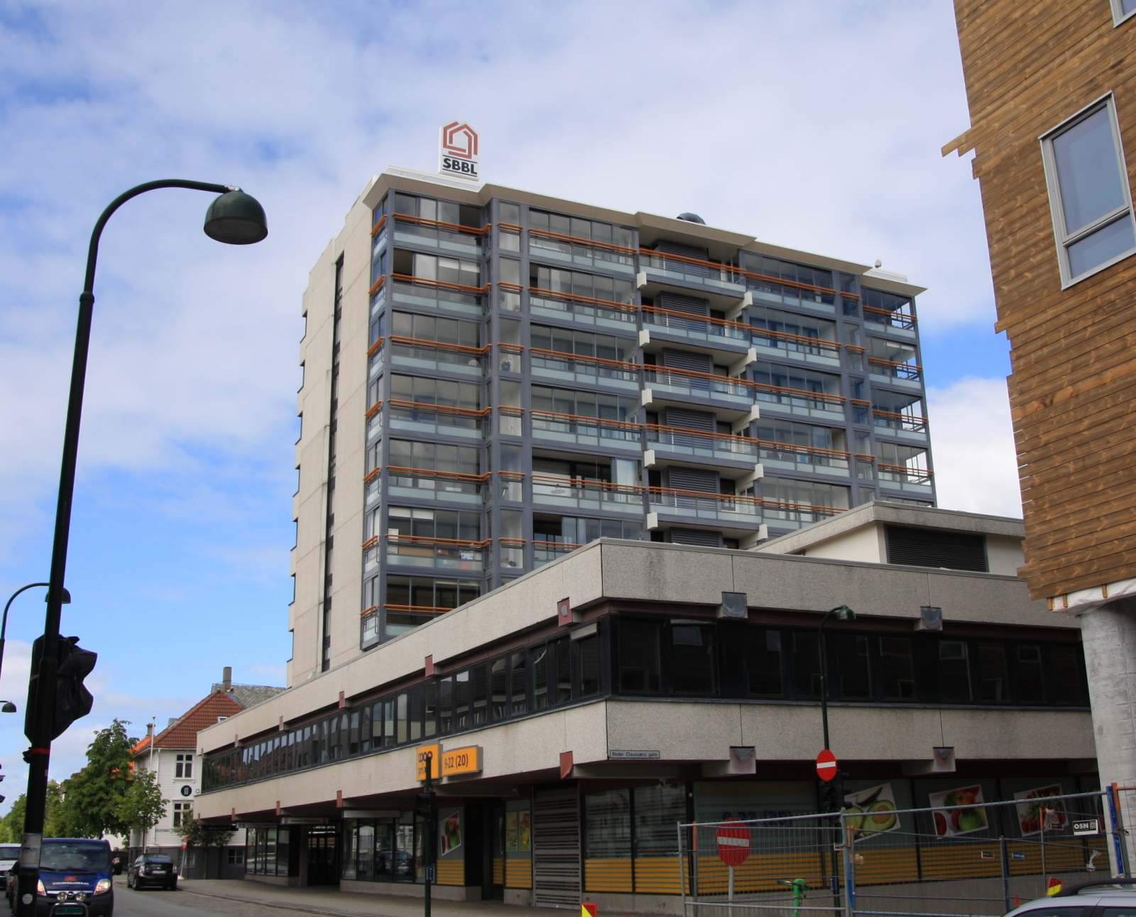 Stavanger Boligbyggelag